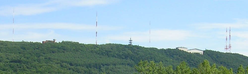 Tentozan, Abashiri, Hokkaido, Japan